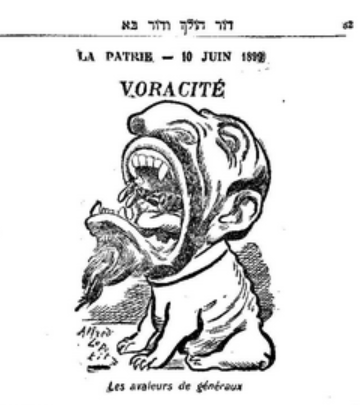 קריקטורה אנטישמית מעיתון צרפתי בשנת 1899